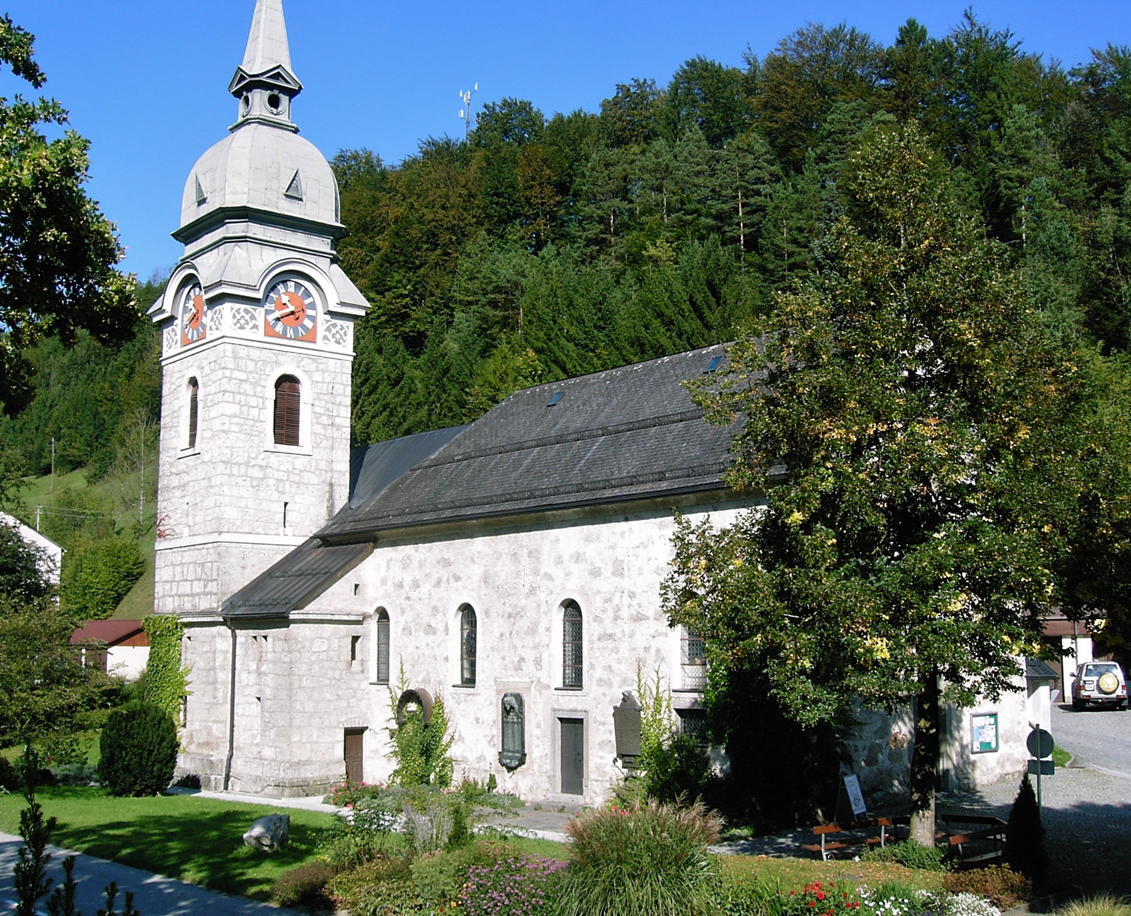 Laussa Katholische Pfarrkirche Maria Himmelfahrt Kirchenplatz